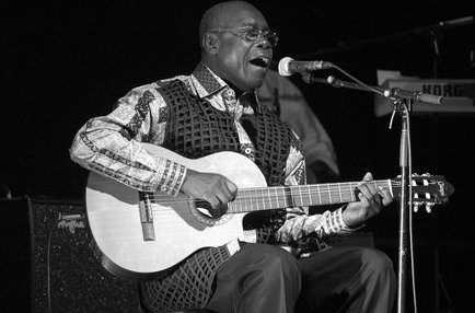 Pierre-Claver Akendengue.